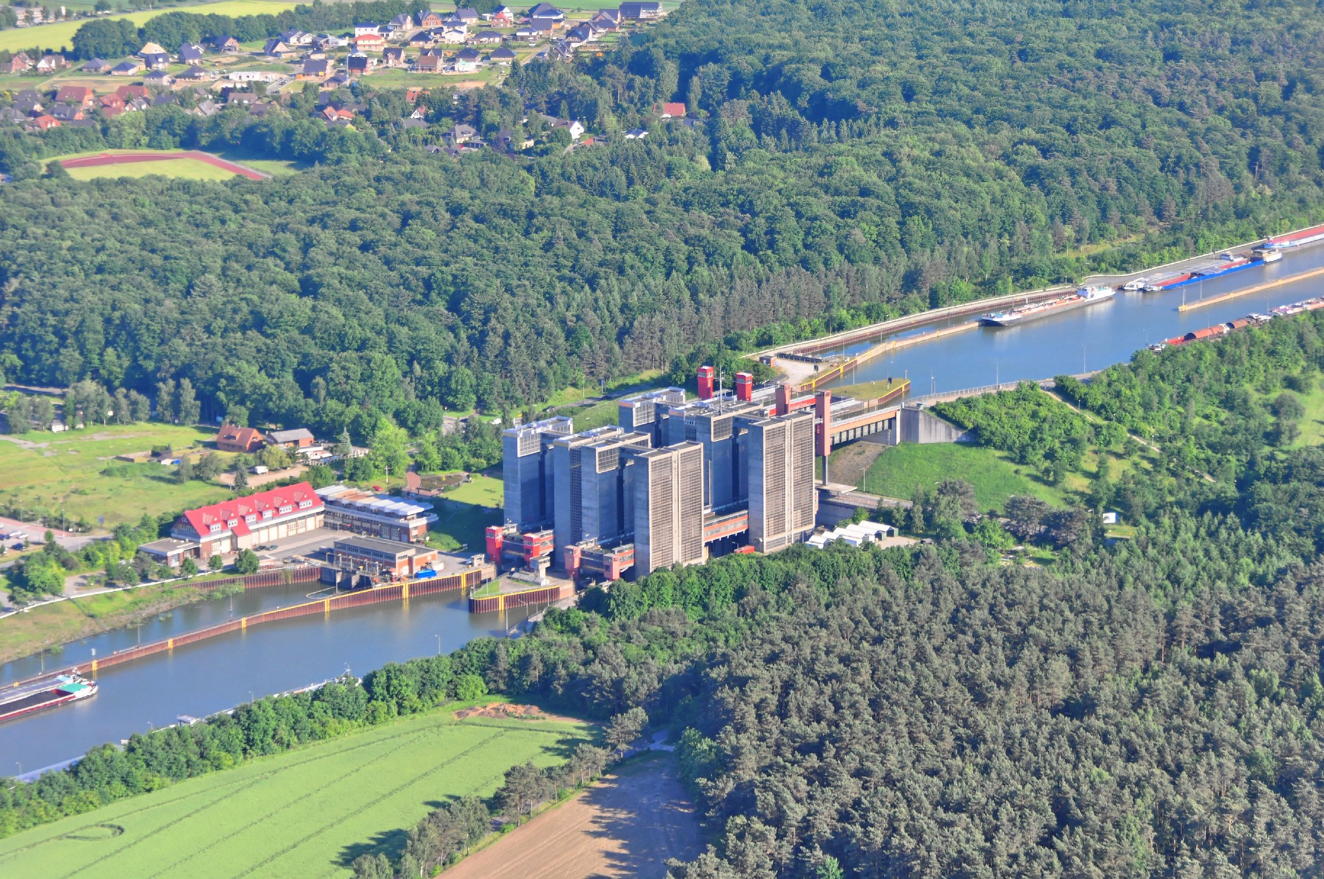 Überführungsflug vom Flugplatz Nordholz-Spieka über Lüneburg, Potsdam zum Flugplatz Schwarzheide-Schipkau